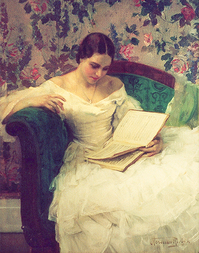 Herman Richir (1866-1942) La partition Huile sur toile, 55,5 x 43,5 cm Collection privée